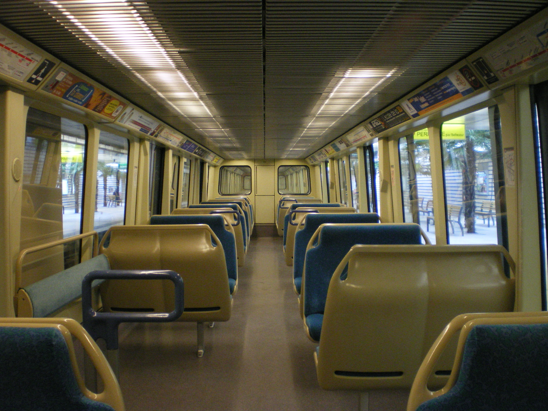 Intérieur d'une rame MPL 75.